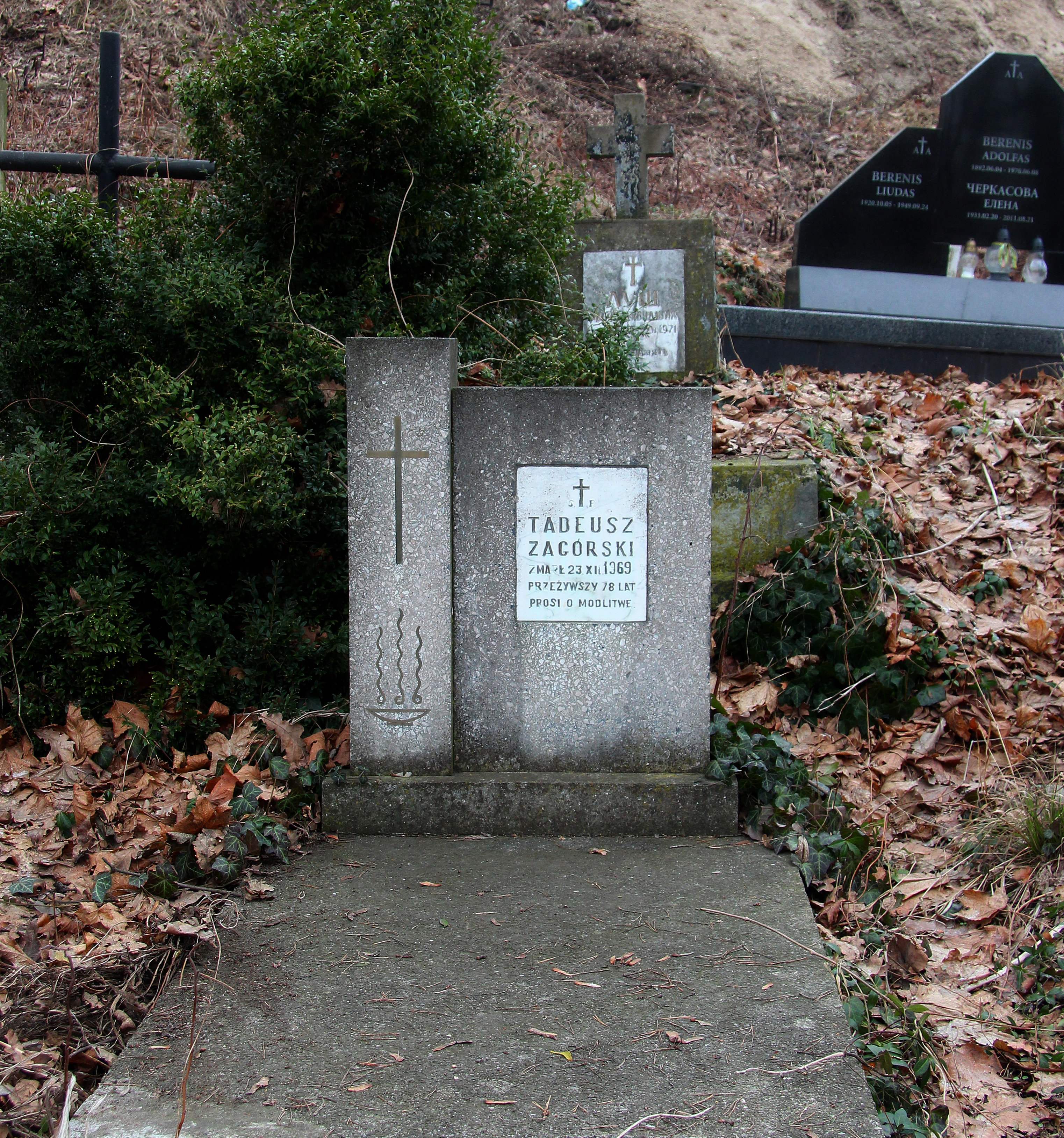 Могила Т. Загурського. Личаківський цвинтар, поле № 36.